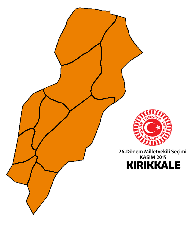 Kasım 2015 Seçimleri